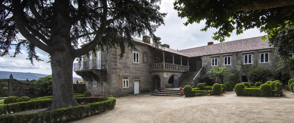 Pazo Cea